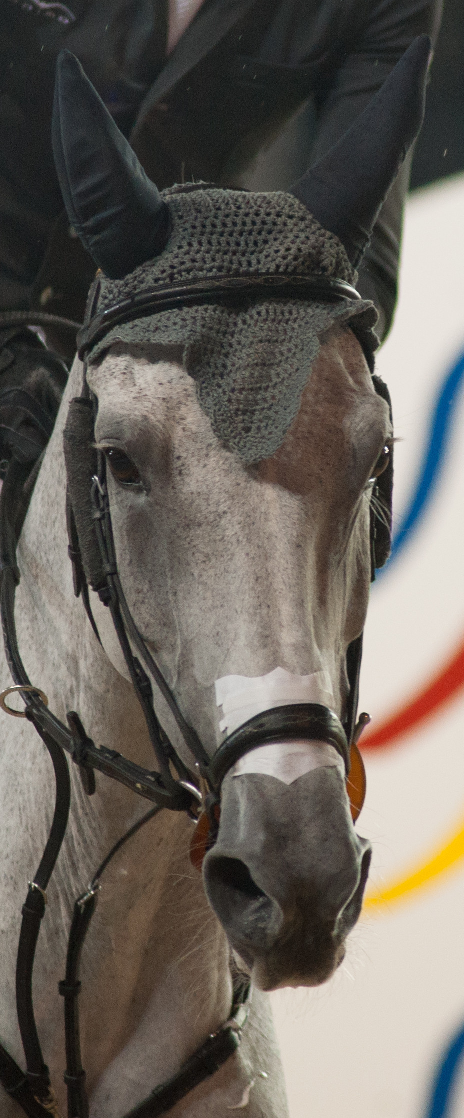 Tête de la jument KWPN Silvana.